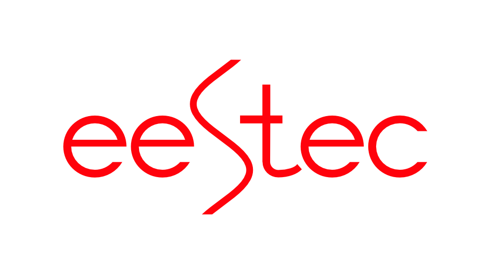 EESTEC logo